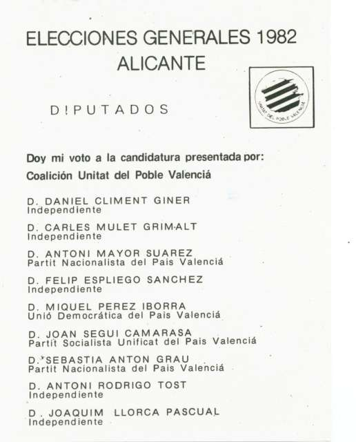 Papereta electoral de la Unitat del Poble Valencià de 1982. Alacant.